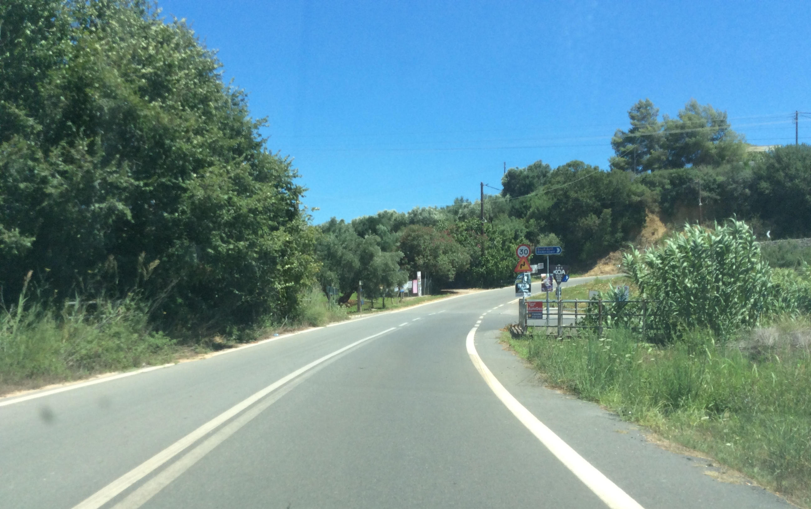 Ρίκια Μεσσηνίας - Διασταύρωση της βορειοδυτικής εισόδου προς τα Ρίκια, με την είσοδο προς την παραλία της Χρυσής Ακτής Τριφυλίας.